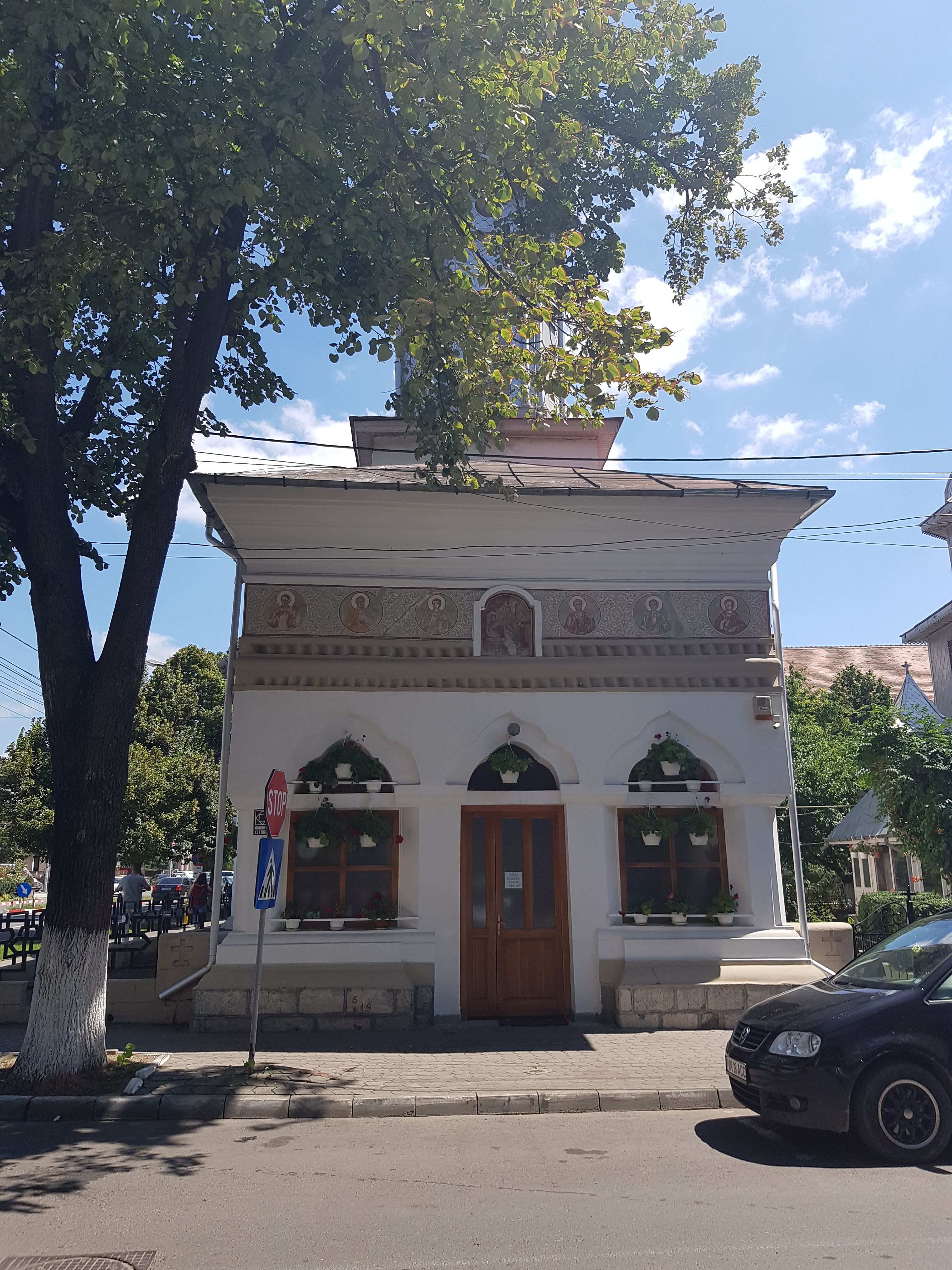 Biserica „Nașterea Maicii Domnului” - Săpunaru